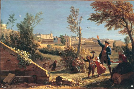 Vista de Madrid con vendedor de pájaros (1715-1730), de Michel-Ange Houasse. Patrimonio Nacional. Palacio de La Granja de San Ildefonso (La Granja, Segovia, España). En segundo plano puede verse el Palacio de la Florida y, al fondo, el Real Alcázar de Madrid, ambos edificios desaparecidos.